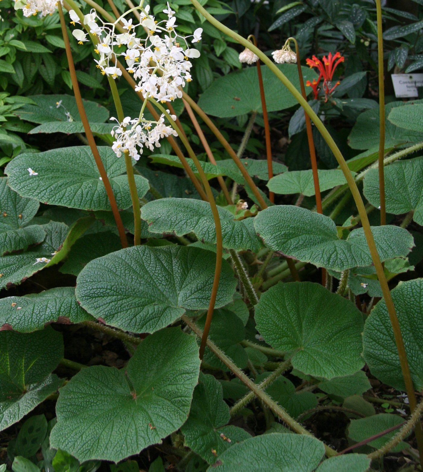 Begonia acida im Botanischen Garten Dresden